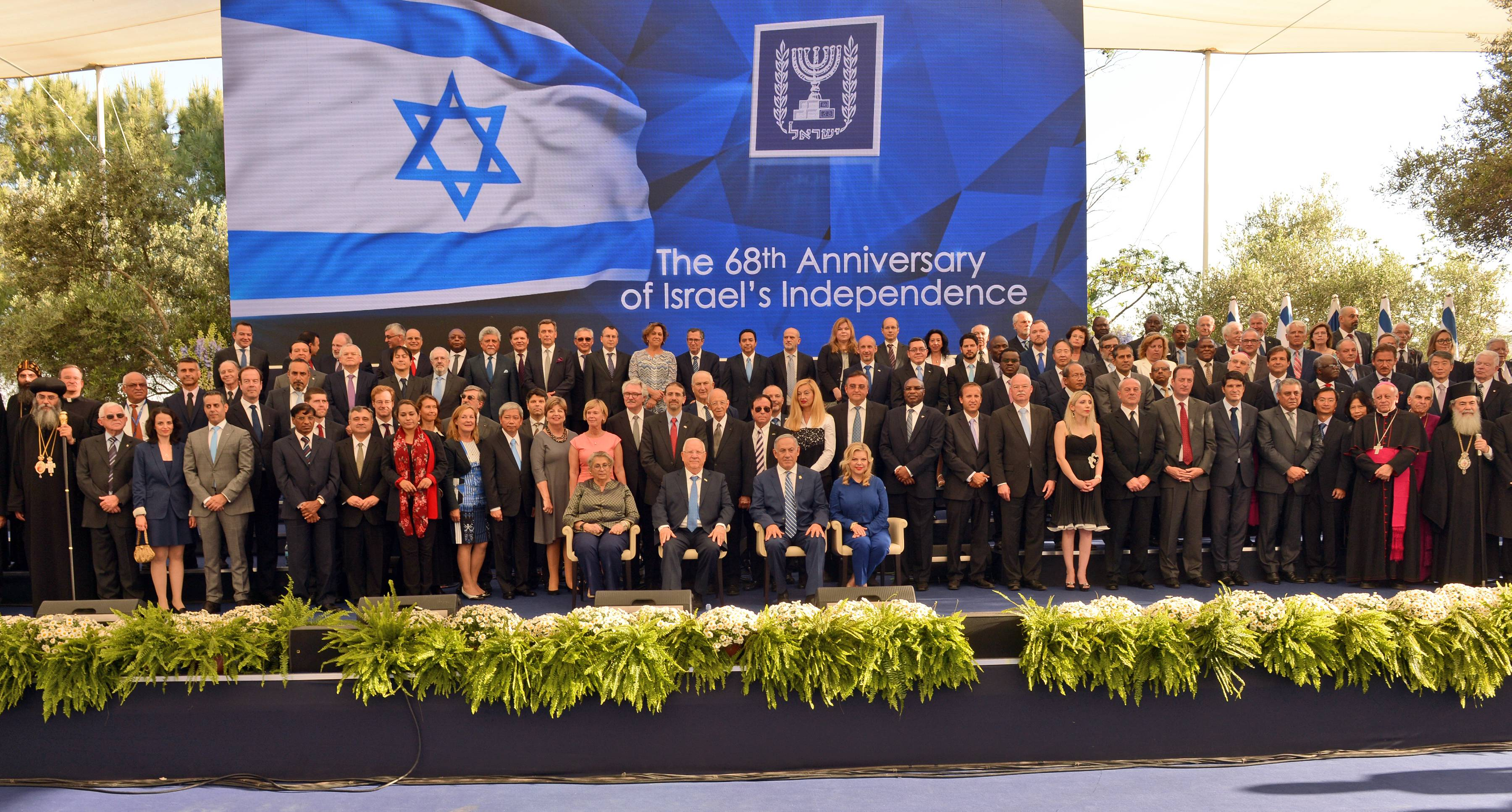 נשיא מדינת ישראל ראובן ריבלין וראש הממשלה בנימין נתניהו בטקס קבלת פנים לסגל הדיפלומטי הזר המוצב בישראל לרגל יום העצמאות ה68